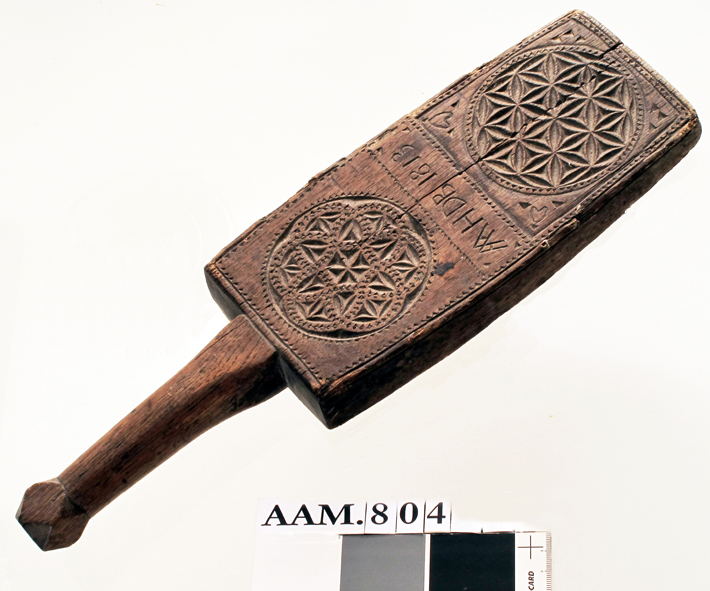 Banketre, redskap til klesvasken